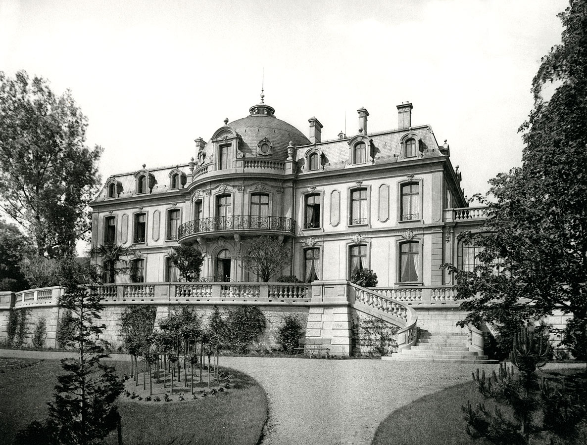 Villa Marcuard an der Laupenstrasse in Bern. Erbaut 1893 von René von Wurstemberger.